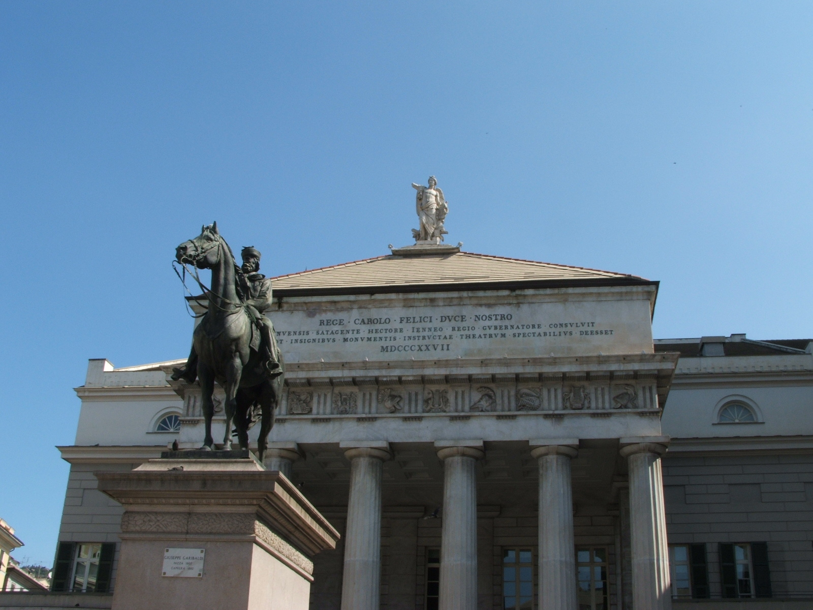 Immagine dalla città di Genova. Statua a Giuseppe Garibaldi in piazza De Ferrari . Inaugurata nel 1879. Autore: scultore Augusto Rivalta (1837-1925). Sullo sfondo il pronao del Teatro Carlo Felice.